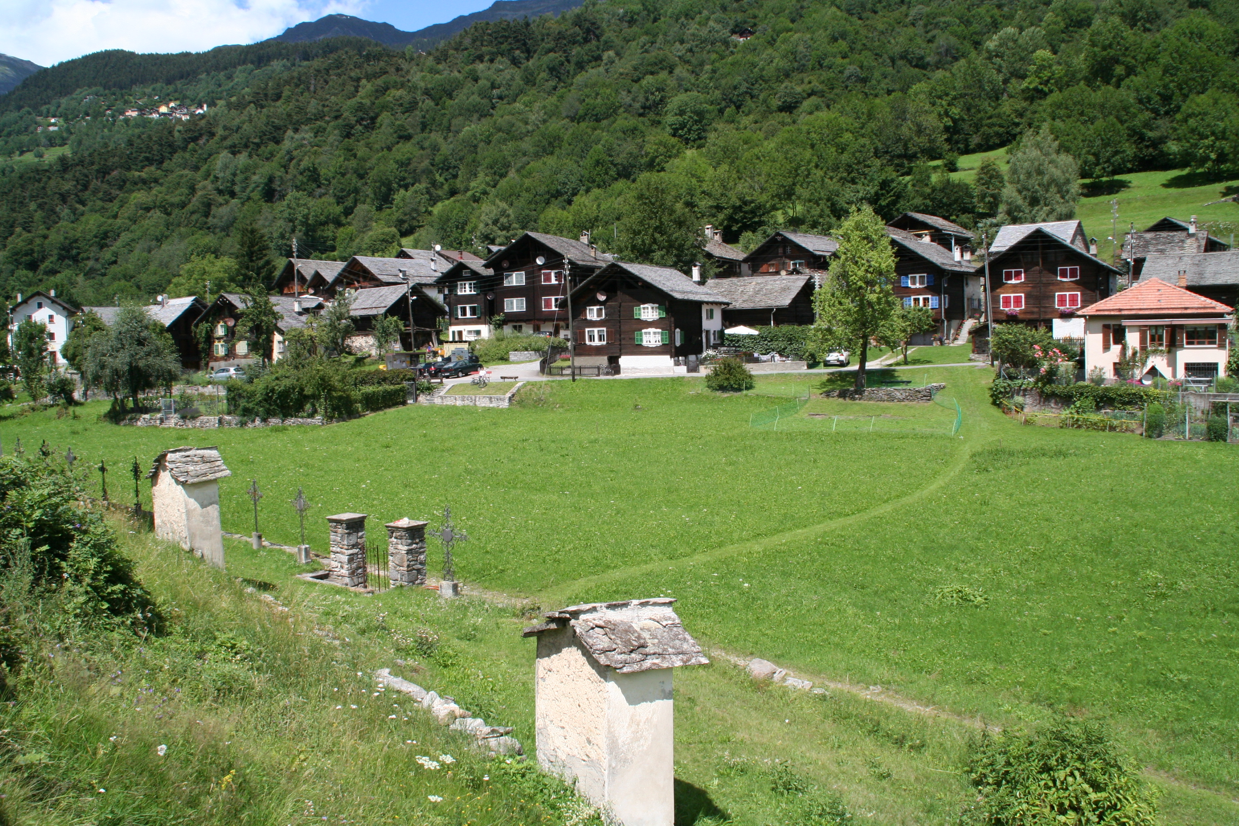 Rossura